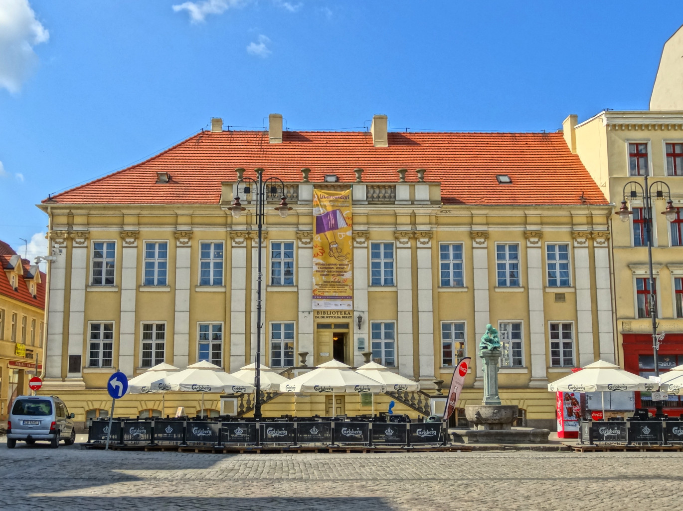 Wojewódzka i Miejska Biblioteka Publiczna w Bydgoszczy, budynek przy Starym Rynku